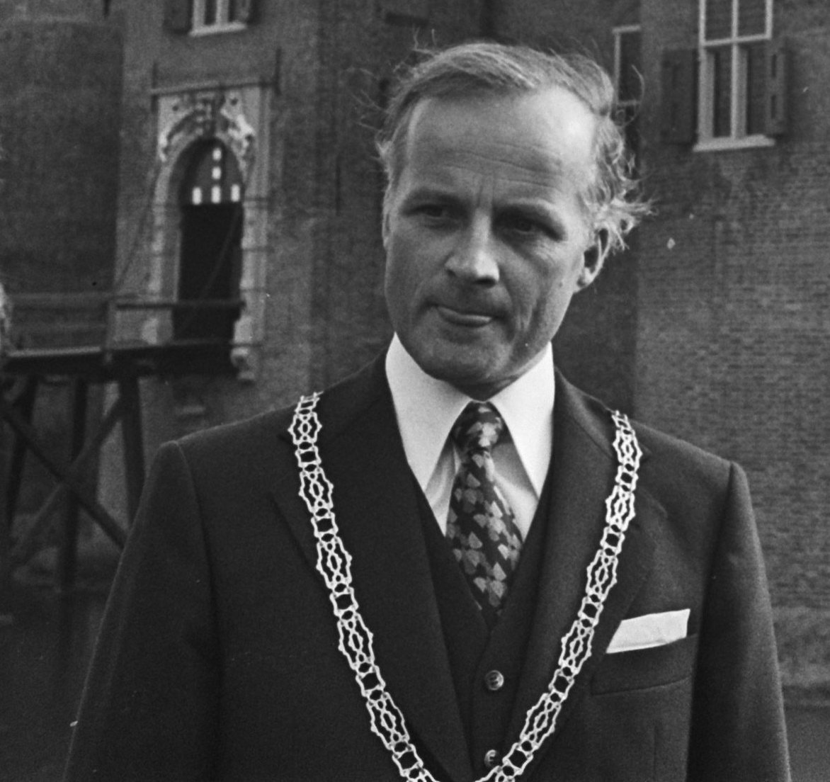 Prins Claus stelt kasteel "Ammersoyen" in Ammerzoden in gebruik; Prins Claus en burgemeester H. T. M. Galama bij kasteel